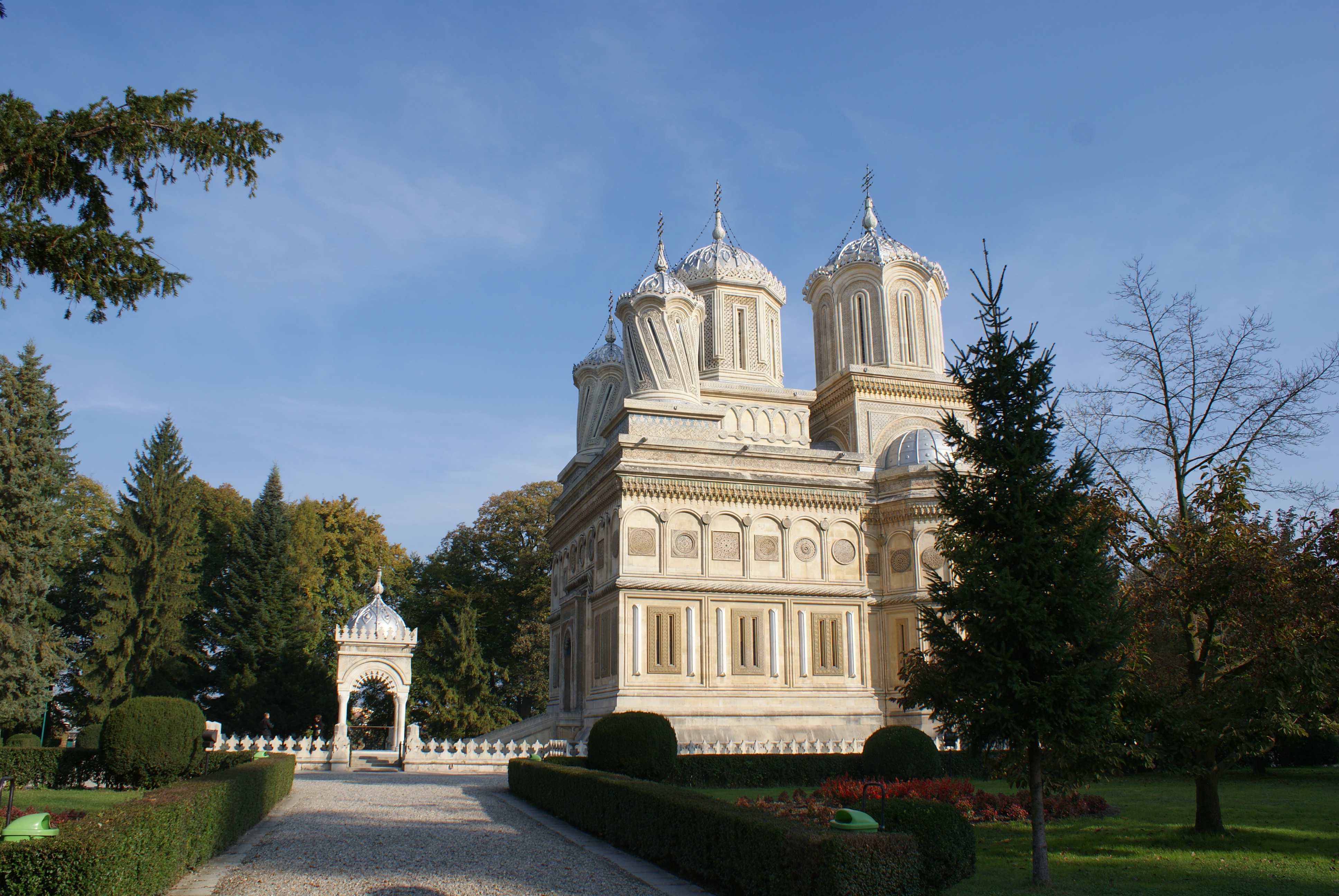 Parcul mănăstirii 05